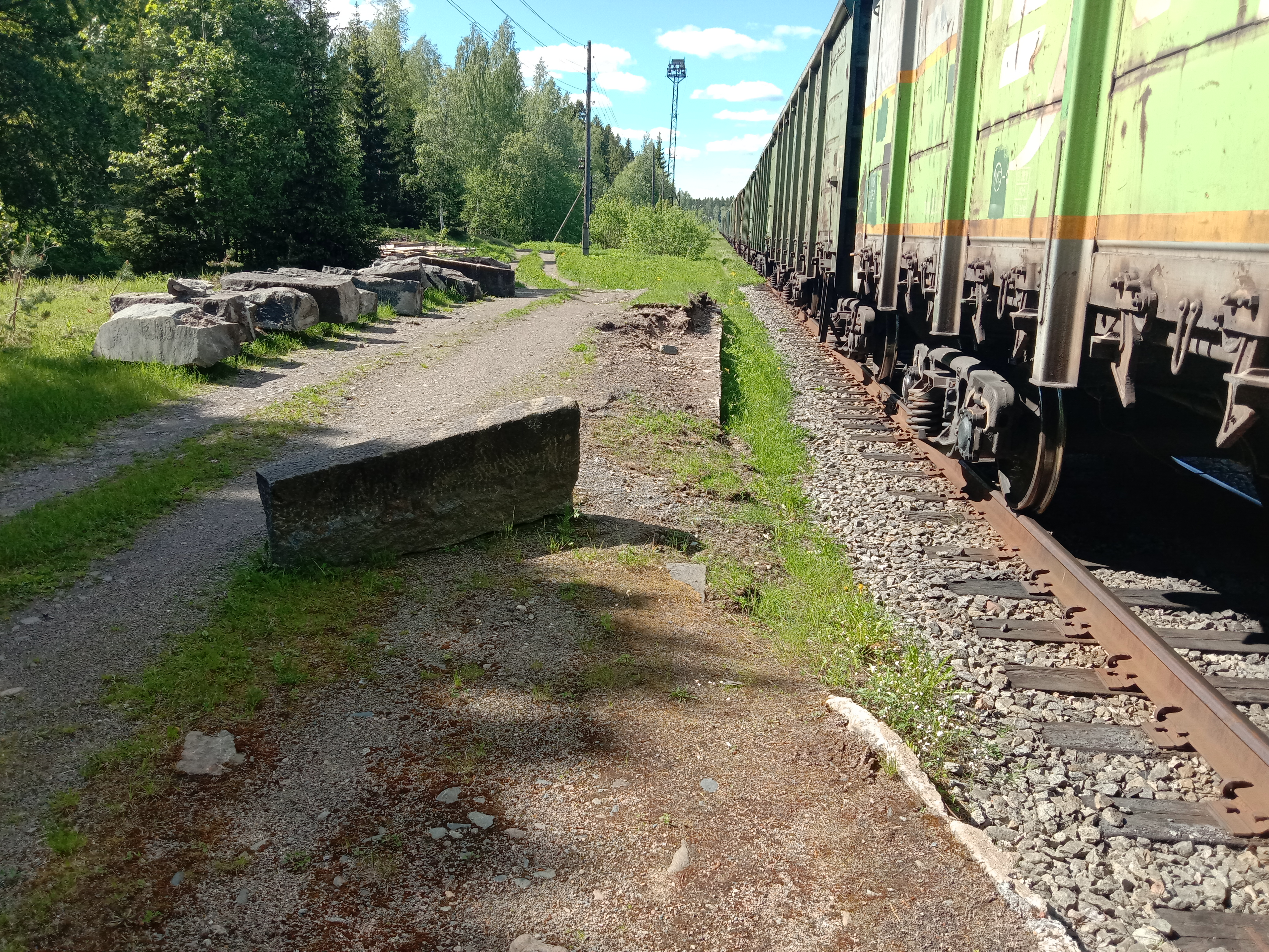 Янисъярви